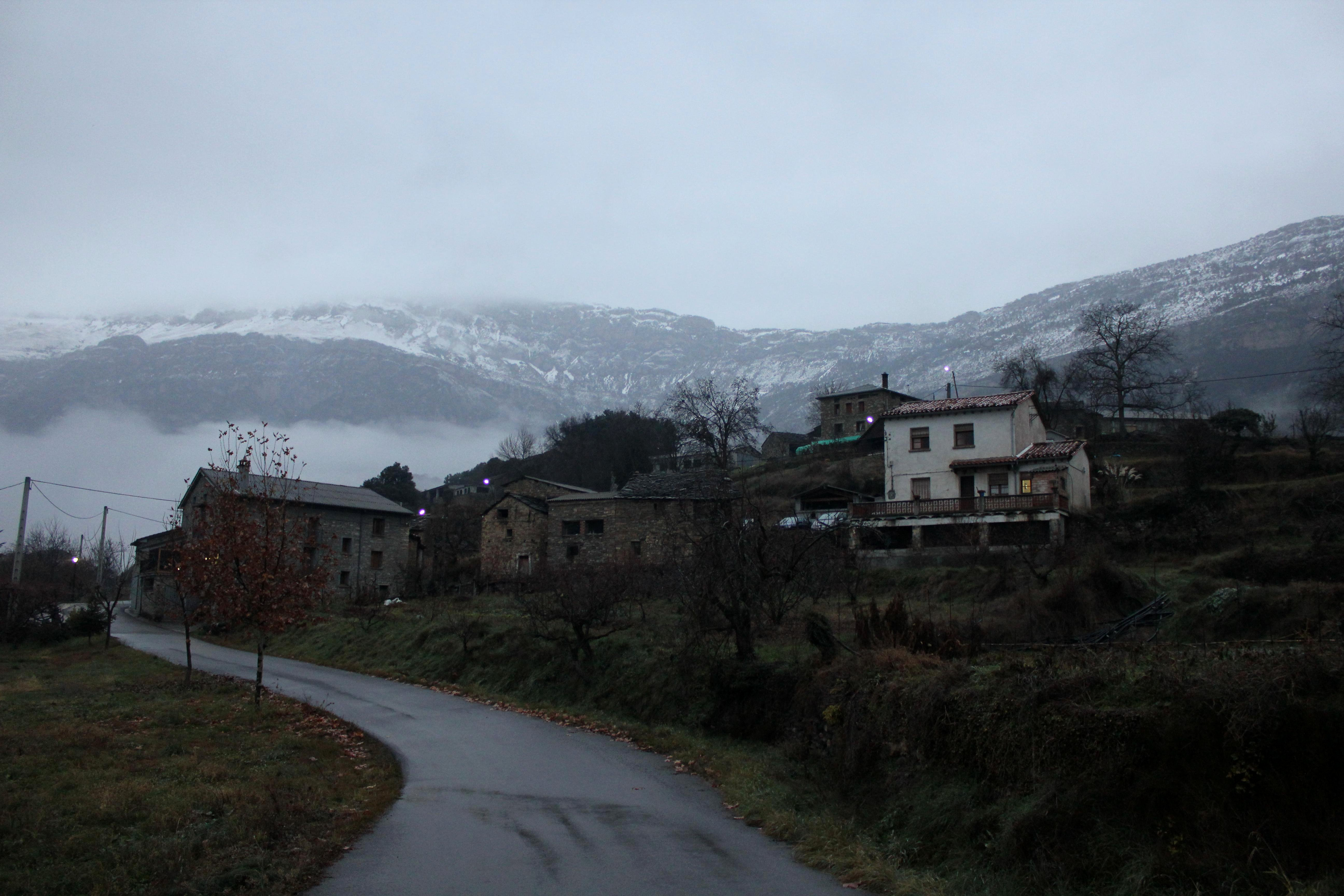 Aragonés: A Cabezonada (A Fueva, Sobrarbe).